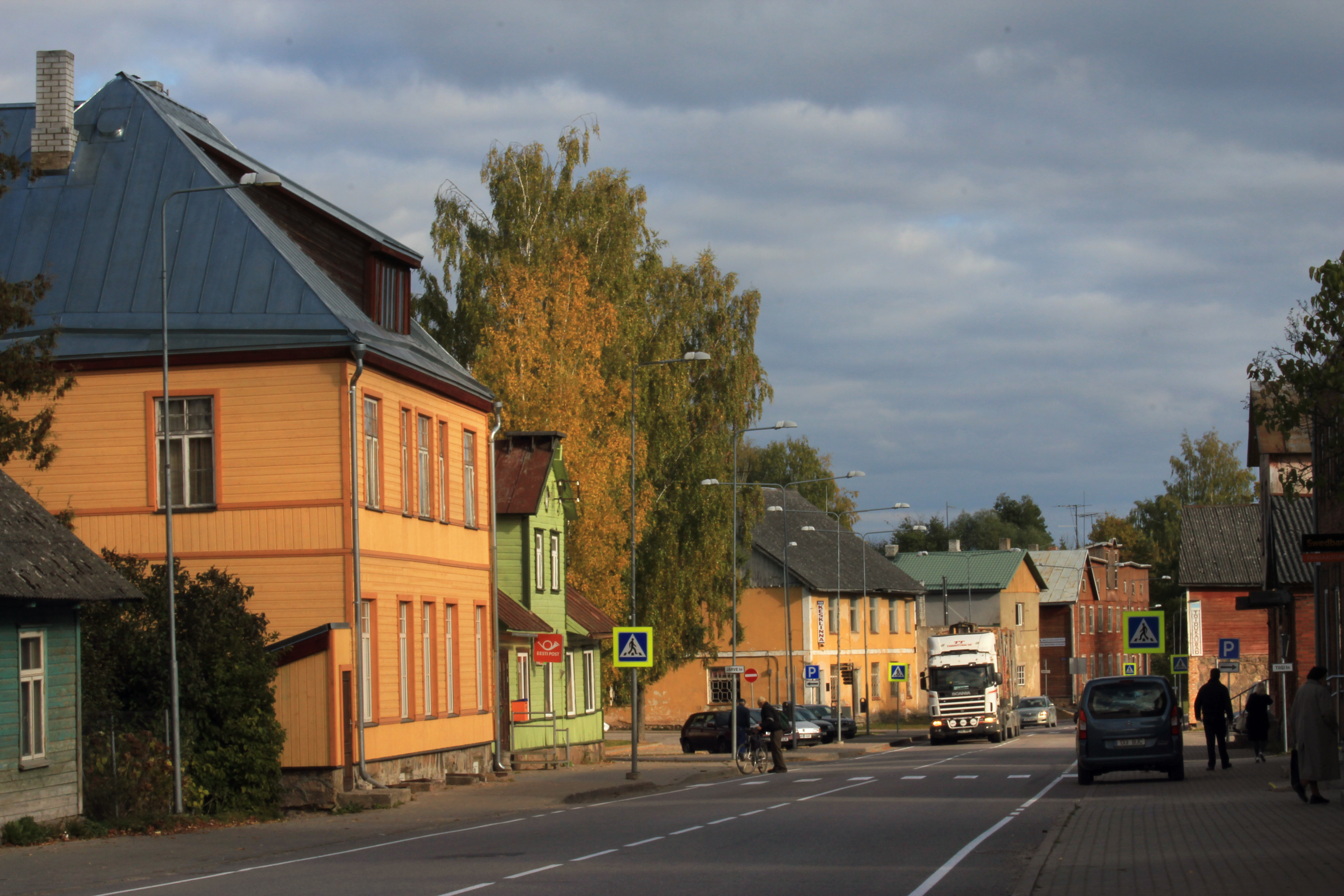 Abja-Paluoja peatänaval